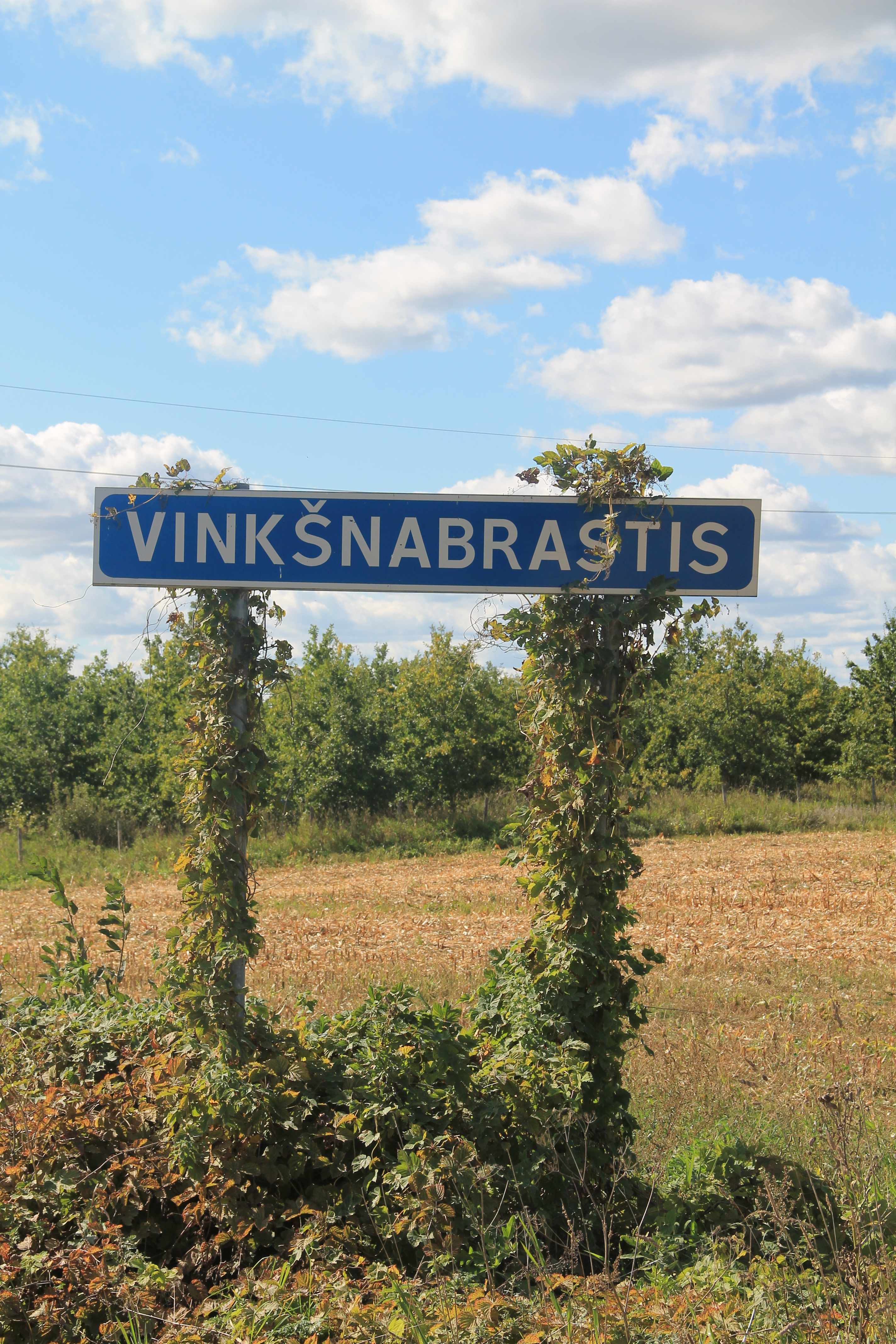 Juozo Vercinkevičiaus nuotr.